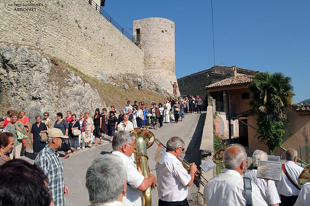 Veduta della Processione che scende dal Castello di Arrone